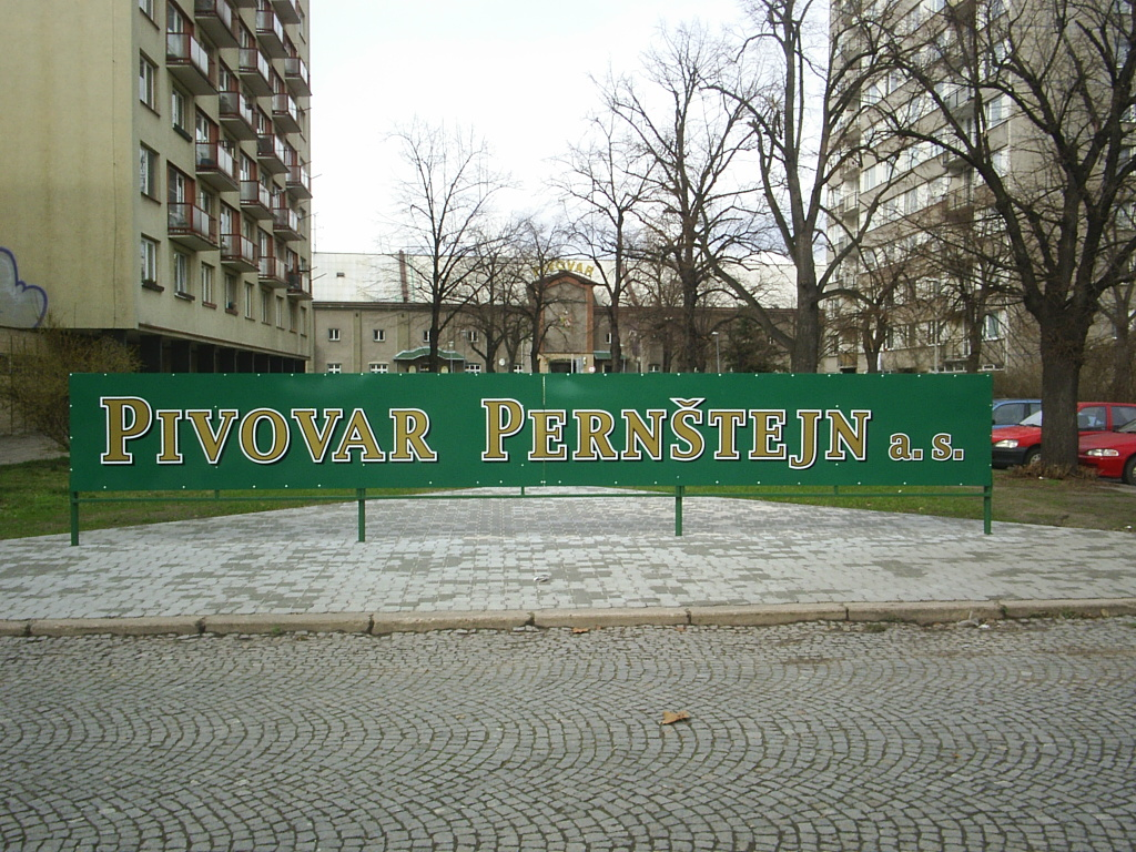 Pardubice-Zelené Předměstí, tabule pred pivovarem Pernštejn, pohled z Palackého třídy